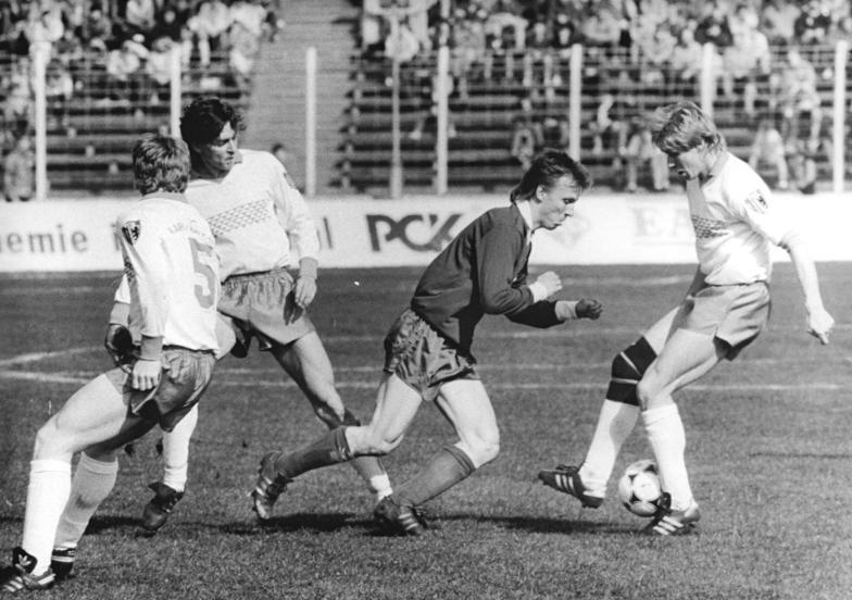 ADN-ZB-Oberst-1.4.89-fd-Berlin: Fußball-Pokalfinale- Zum drittenmal in seiner Klubgeschichte gewann der BFC Dynamo den FDGB-Pokal im Fußball. Vor 38.000 Zuschauern im Stadion der Weltjugend bezwang der Cupverteidiger den FC Karl-Marx-Stadt mit 1:0 (0:0). Schütze des "goldenen" Tores war Nationalspieler Andreas Thom in der 57. Minute (3.v.l.), der von den Karl-Marx-Städter Spielern Jörg Illing, Peter Köller und Sven Köhler (v.l.) nicht zu halten war."